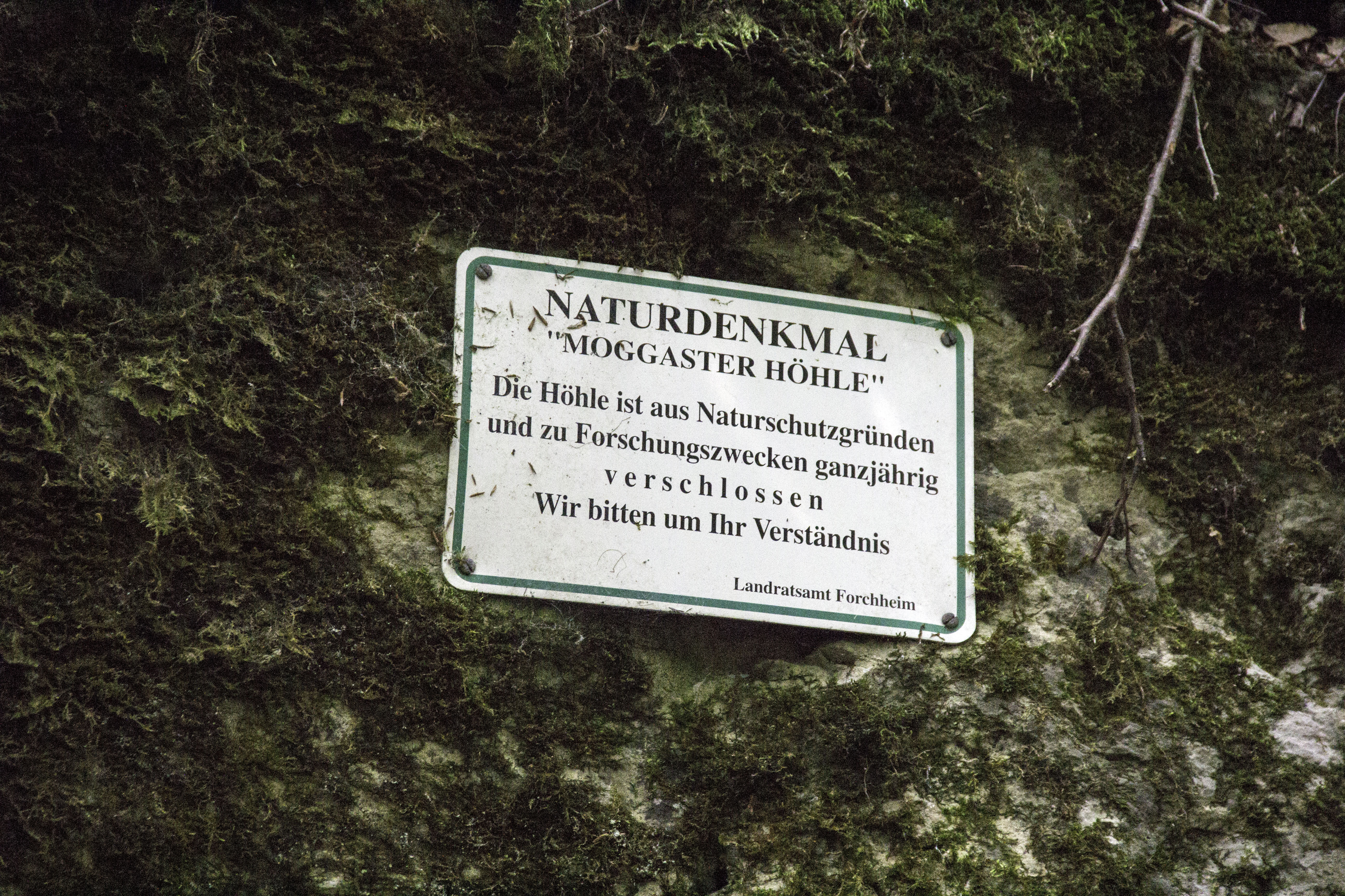 Moggaster Höhle, D 110